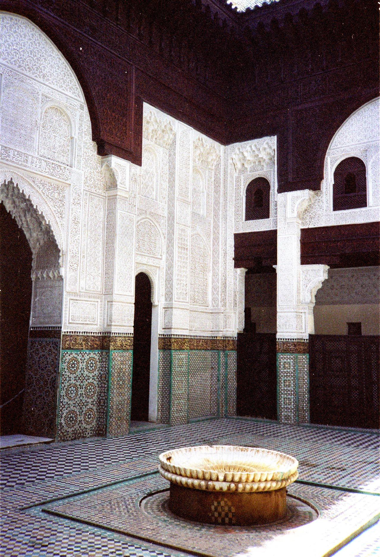 Cour de la medersa Bou Inania à Meknès (Maroc). La construction commença avec le début du règne de Abû Hasan en 1331, mais elle ne fut teminée que 20 ans après en 1351, sous le règne de Abû `Inân Fâris al-Mutawakkil dont elle porte le nom. Il y a une medersa homonyme et plus célèbre à Fès.